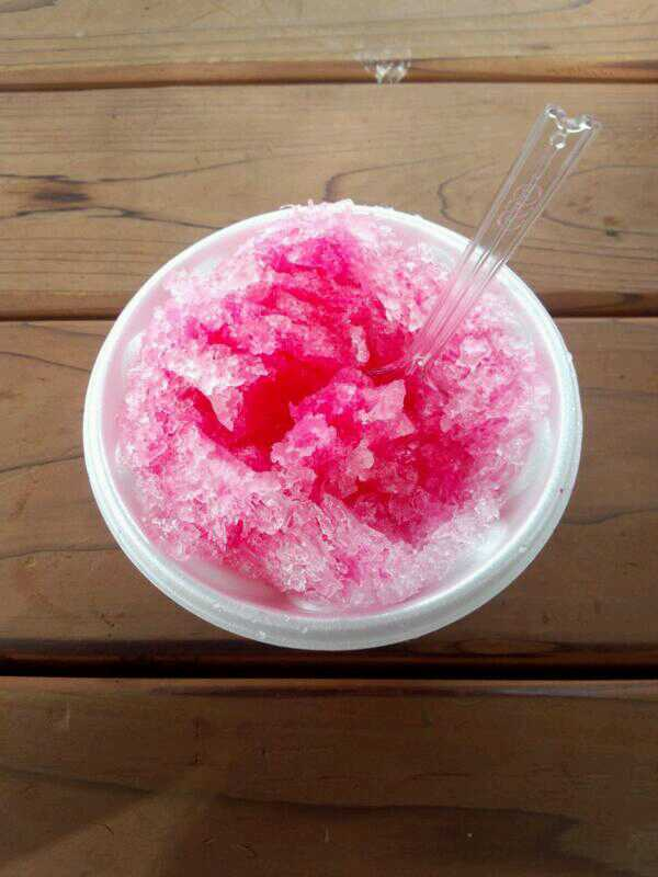 イチゴシロップかき氷